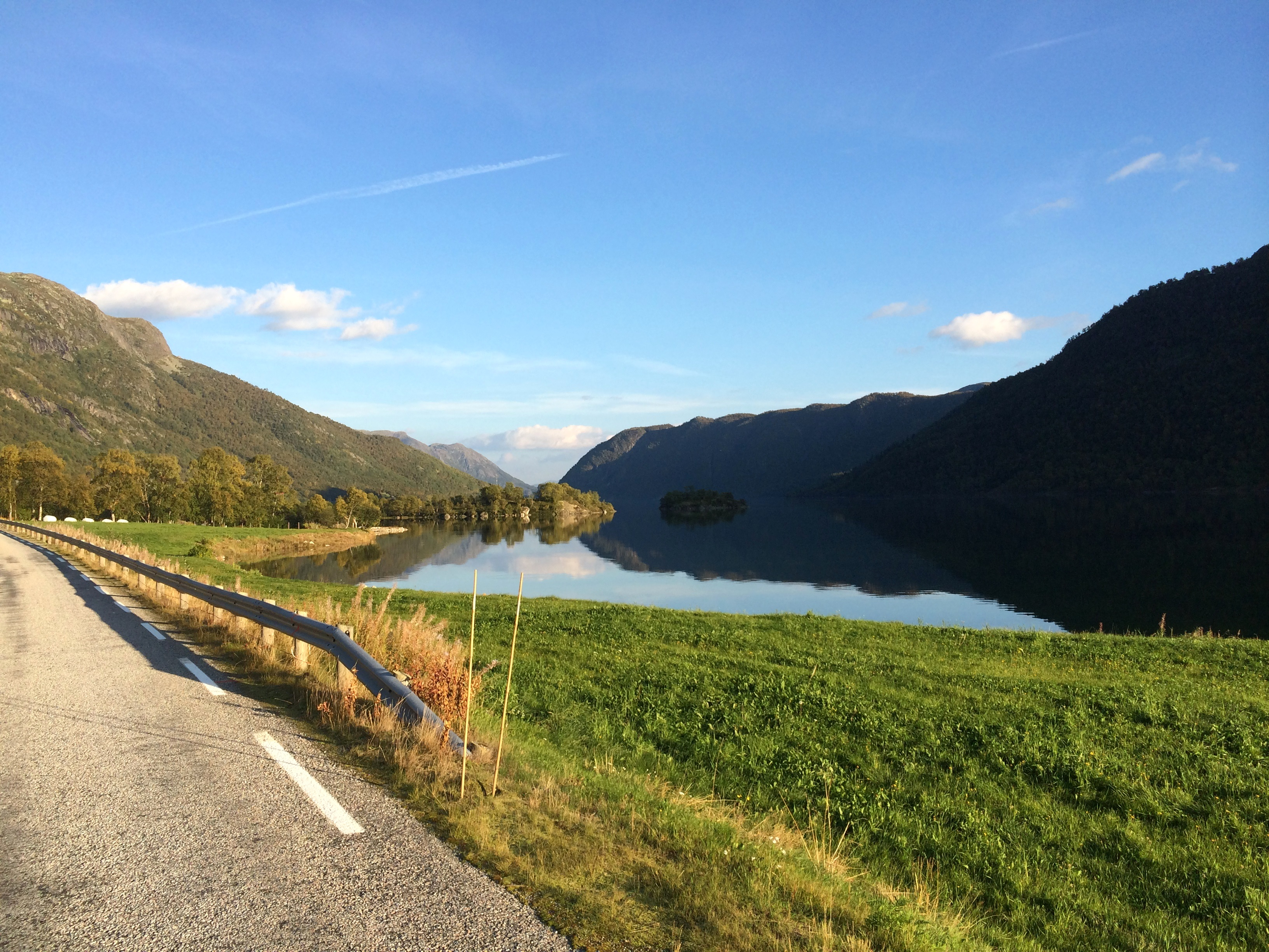 Fylkesvei 362 langs Totak ved Arabygdi